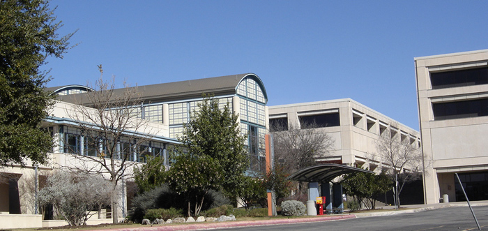 UTSA